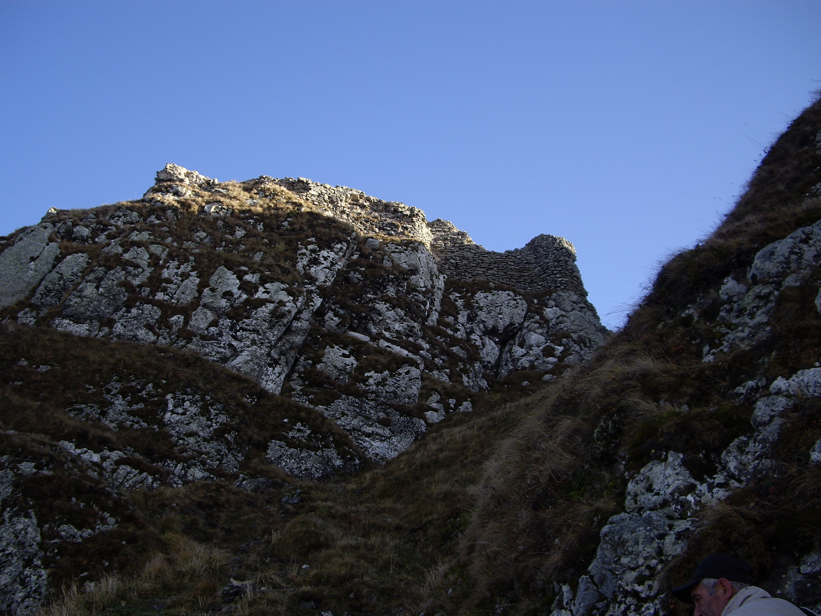 კლდეკარის ციხის ხედი ქვემოდან